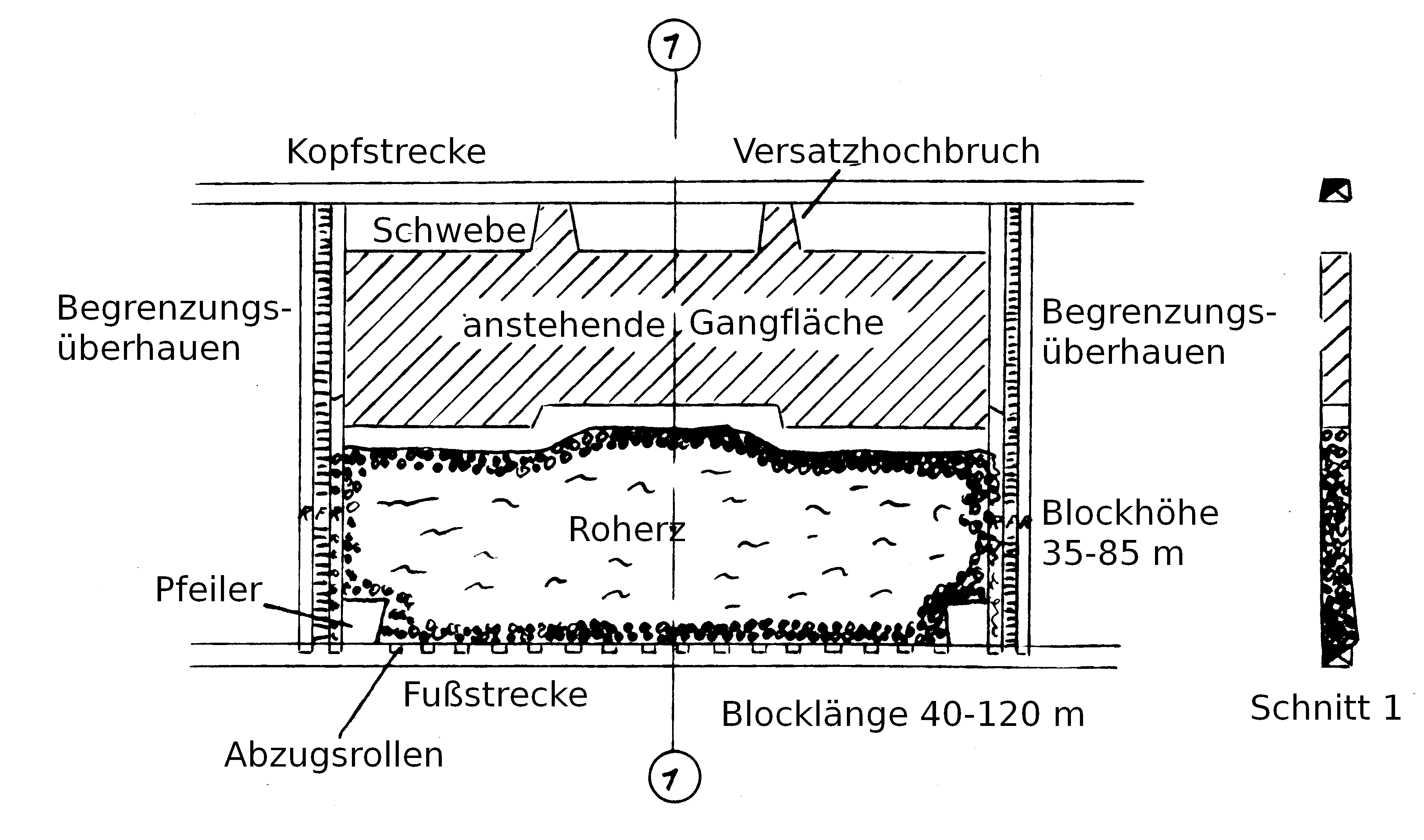 Schema Magazinbau im Gangerzbergbau. Abbaublock mit Kopf- und Grundstrecke.